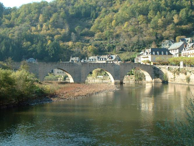 Pont à l'entrée d'Estaing surplombant le Lot. Photo prise le 12 octobre 2005.